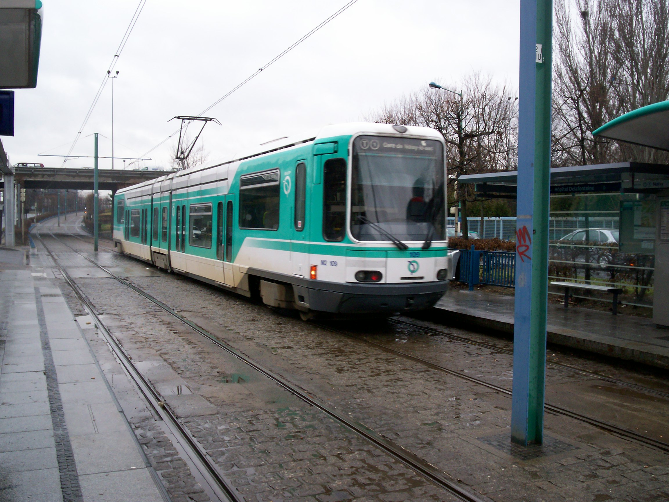 T1 à Hôpital Delafontaine